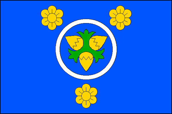 vlajka, Leština, okres Šumperk